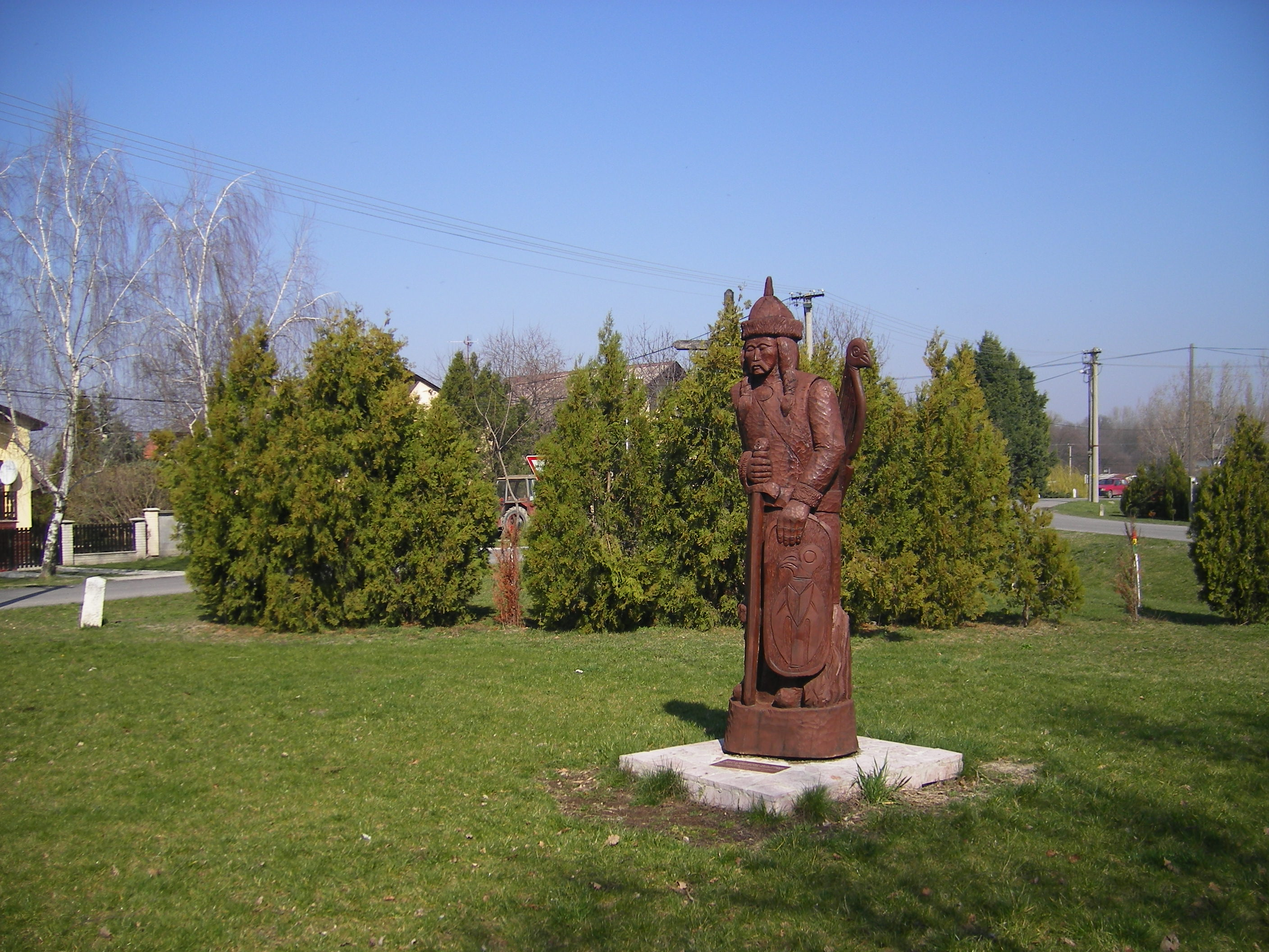 Csicsó - Atilla faszobra